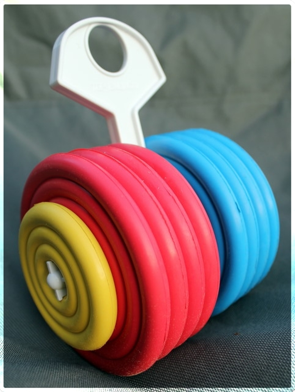 Komplet ploščkov za prstomet